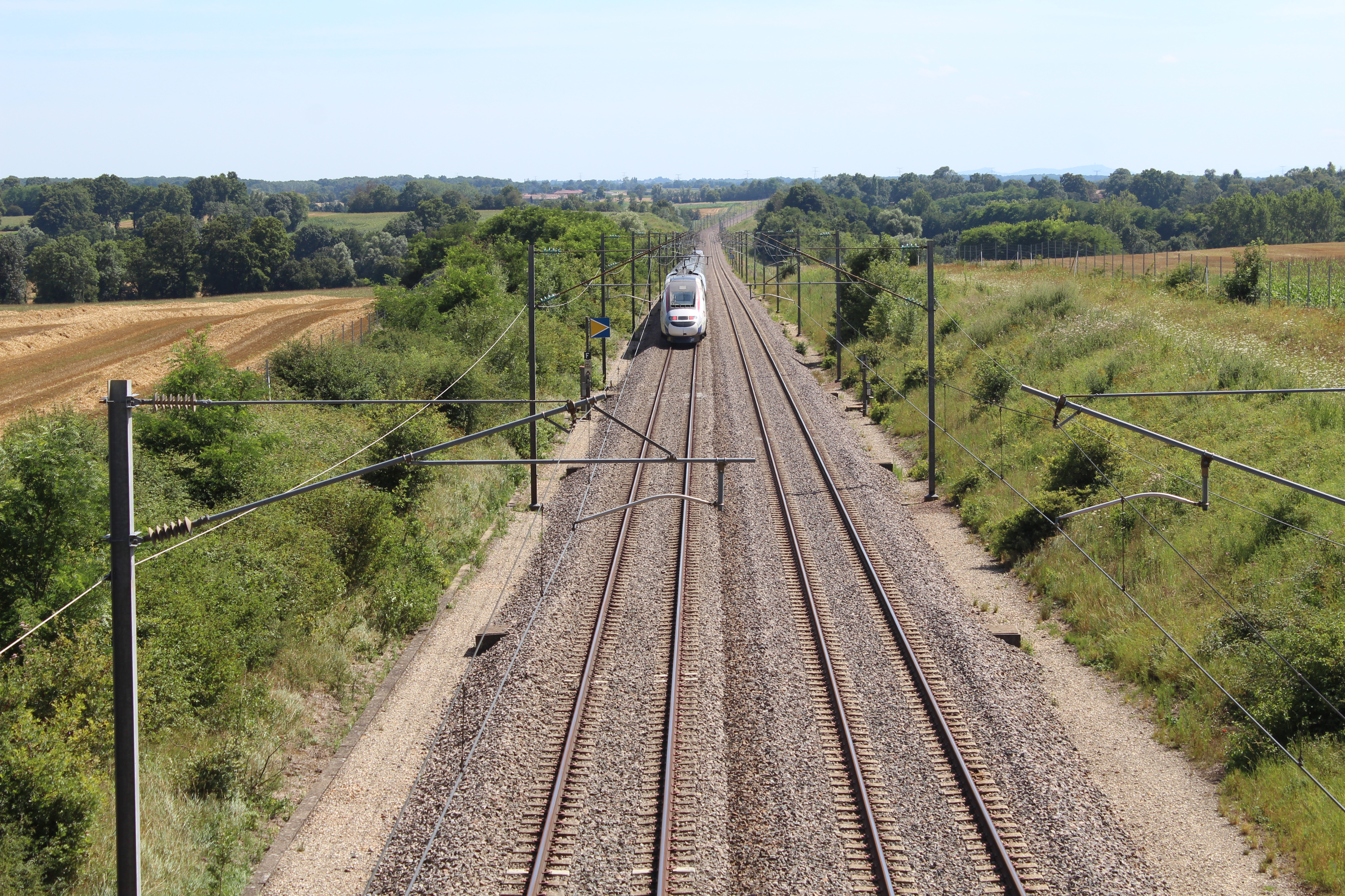 Ligne TGV Sud-Est à Cruzilles-lès-Mépillat.